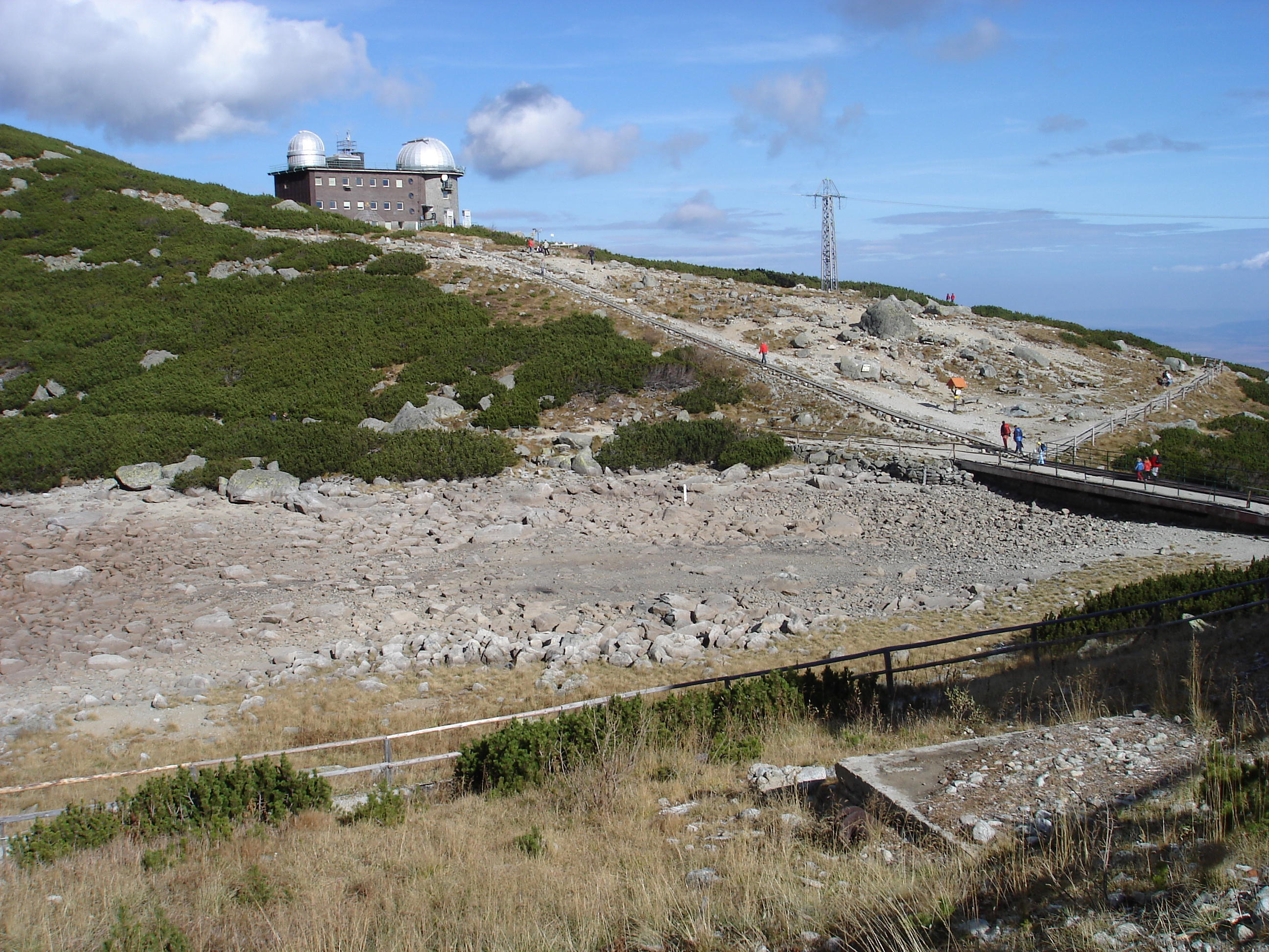 Observatórium Skalnaté pleso